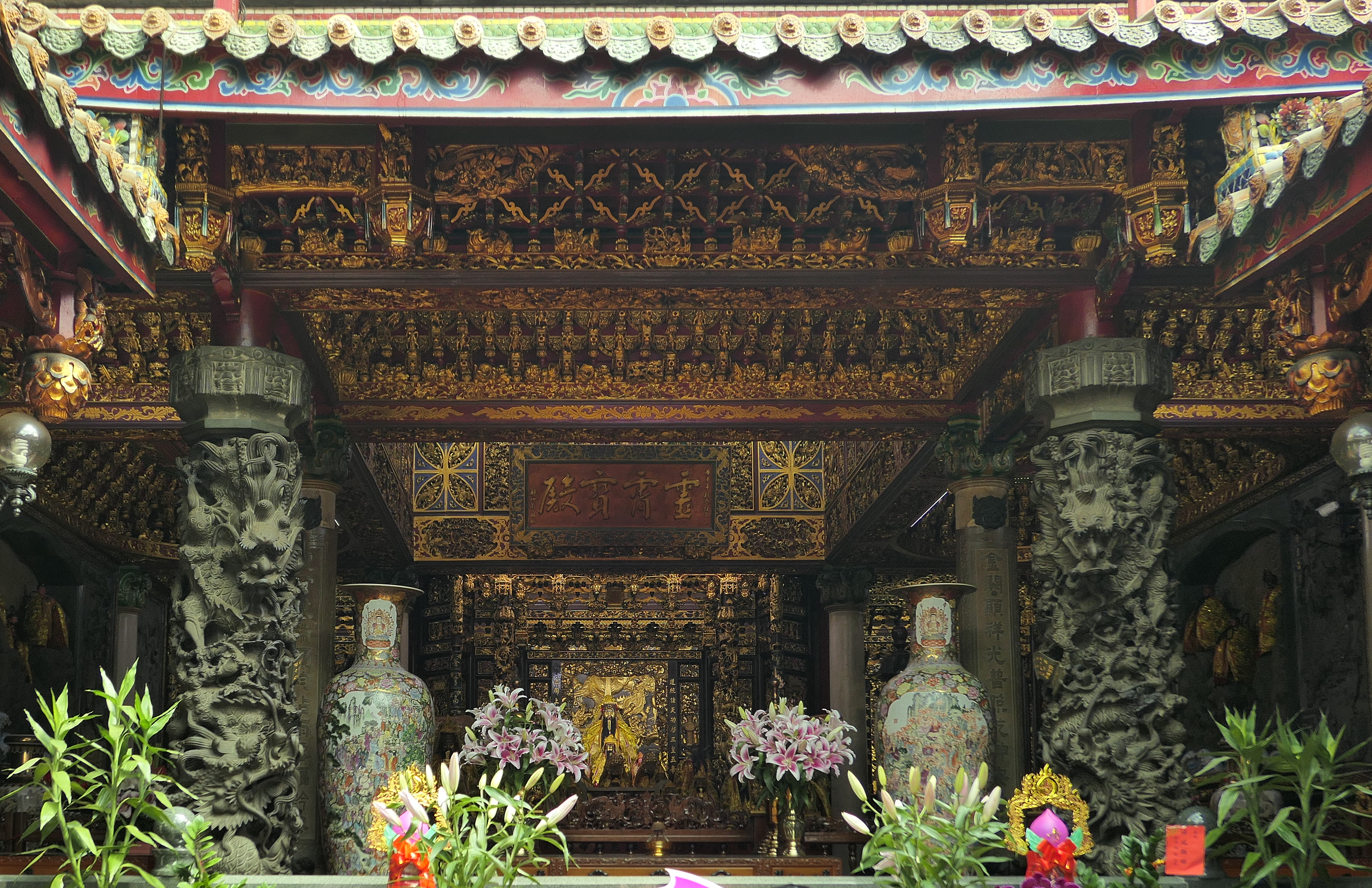 中文（台灣）: 新竹天公壇內部